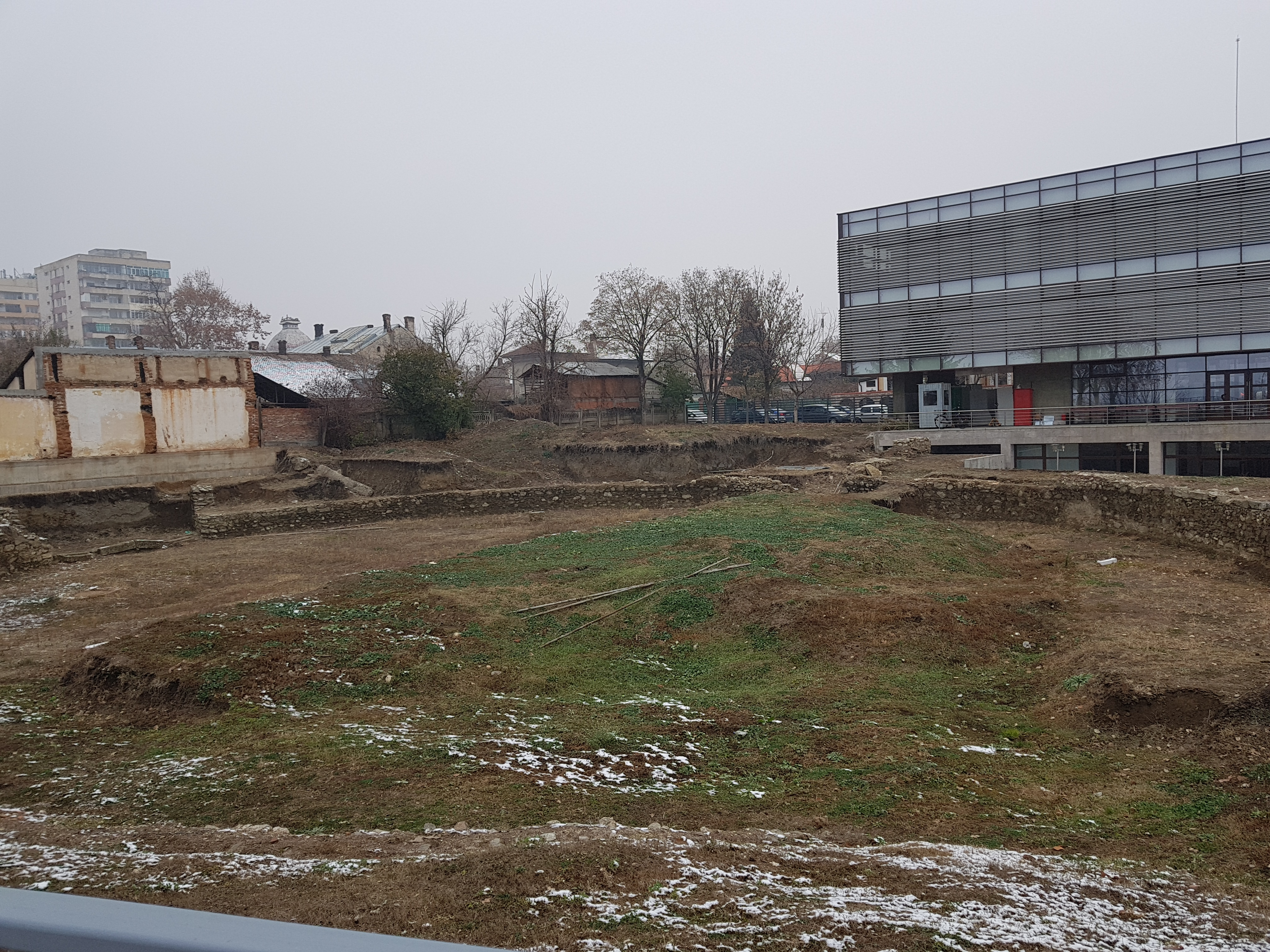 Situl arheologic de la Drobeta Turnu Severin